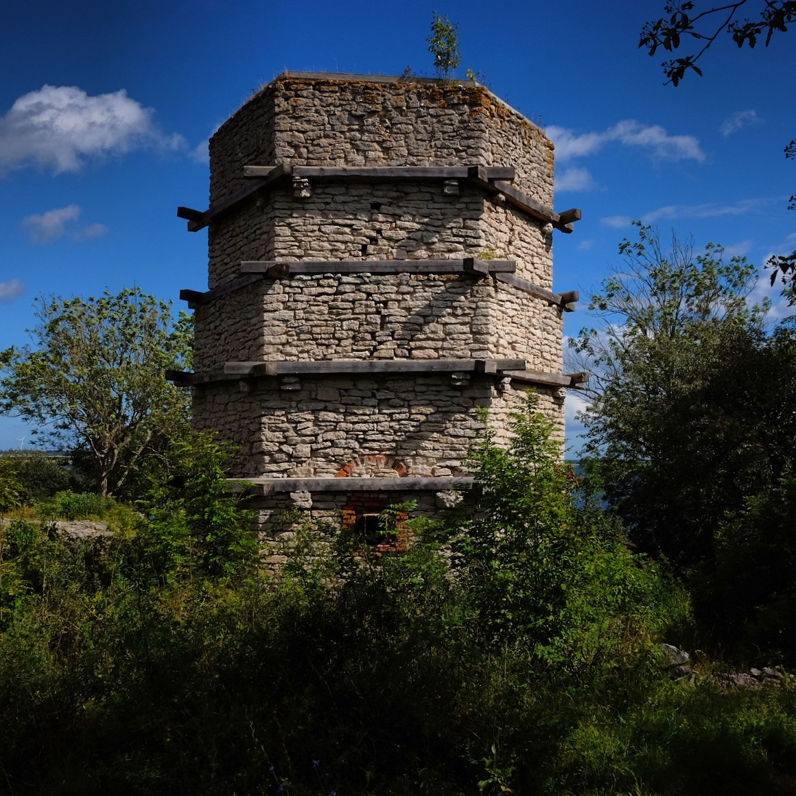 Kalkugn, Kyllaj, 1882.